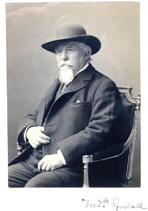 Fotographie des englischen Malers Frederick Goodall (1822–1904).